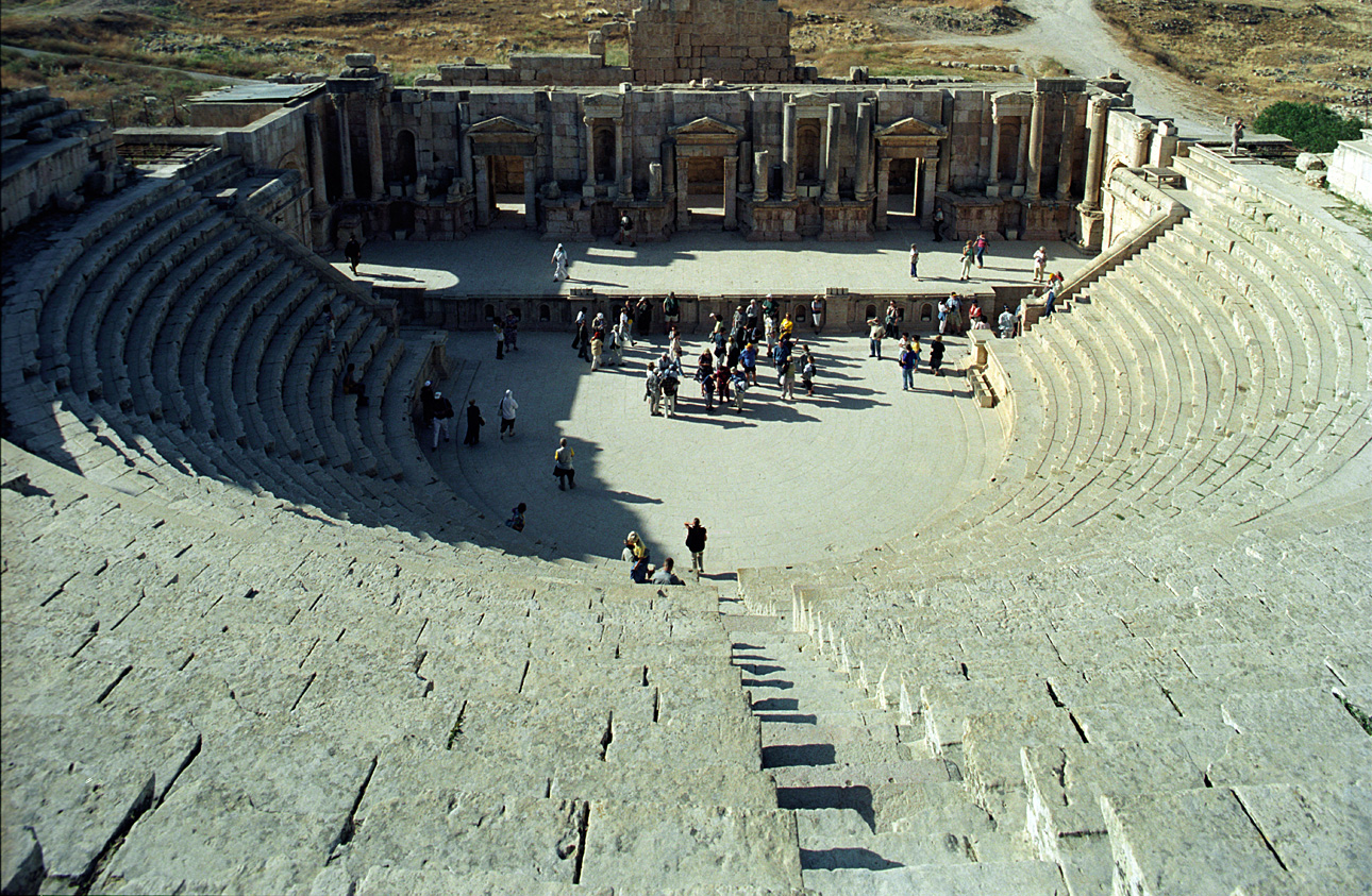 Jerash, Jordan